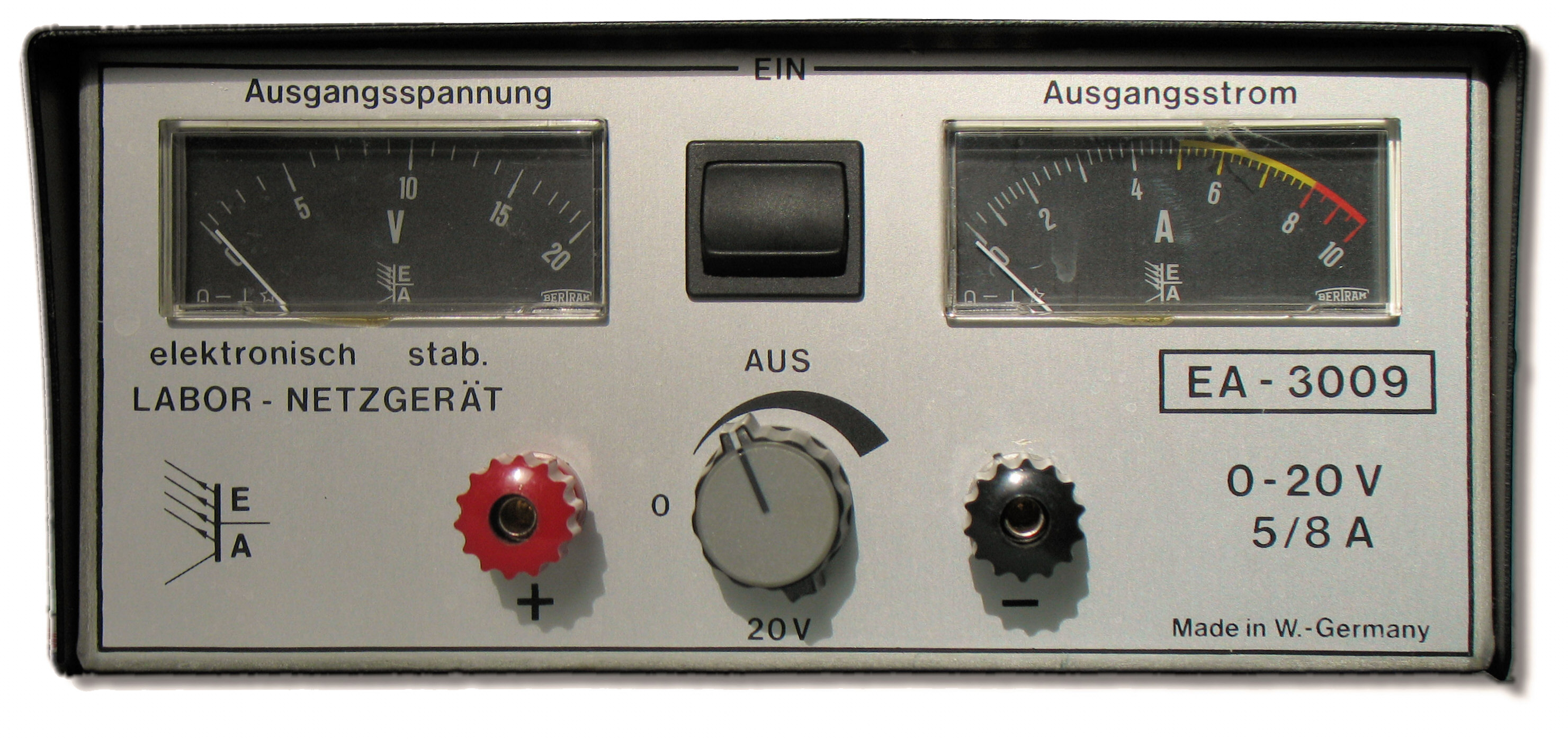 Labornetzteil mit einstellbarer Ausgangsspannung und zwei analogen Zeigerinstrumenten für Ausgangsspannung und Ausgangsstrom